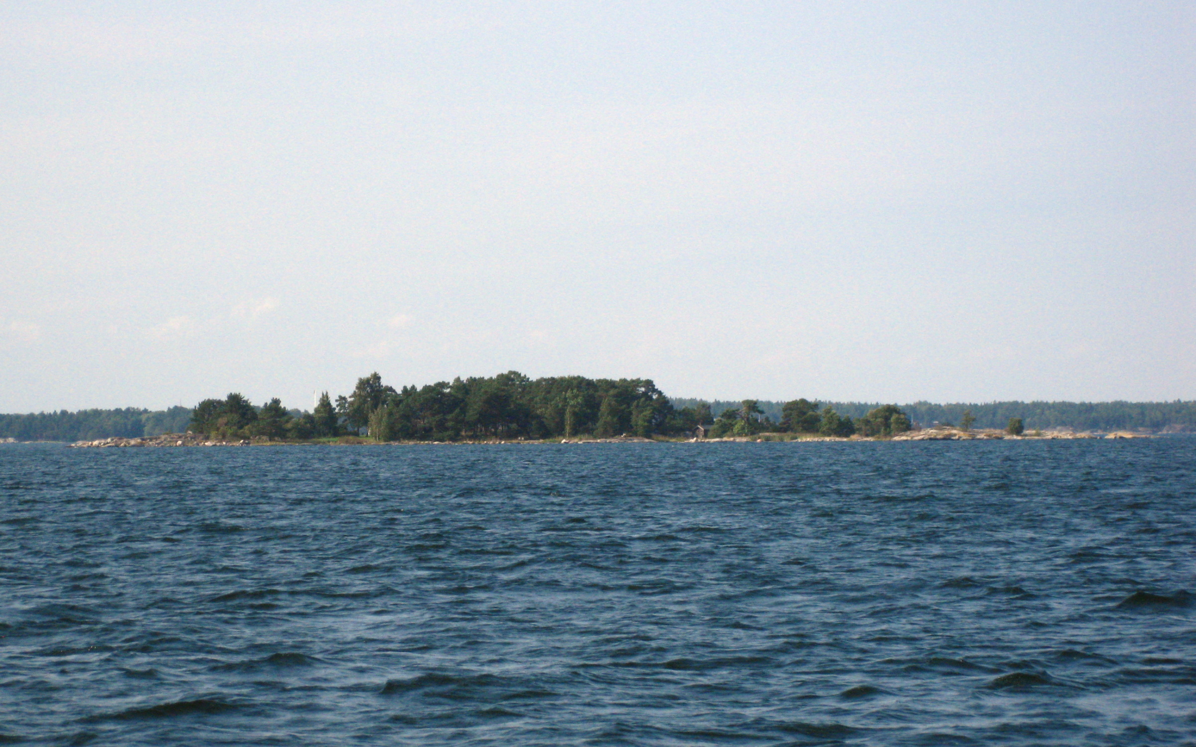 Trulsör, Möja västerfjärd, Stockholms skärgård.